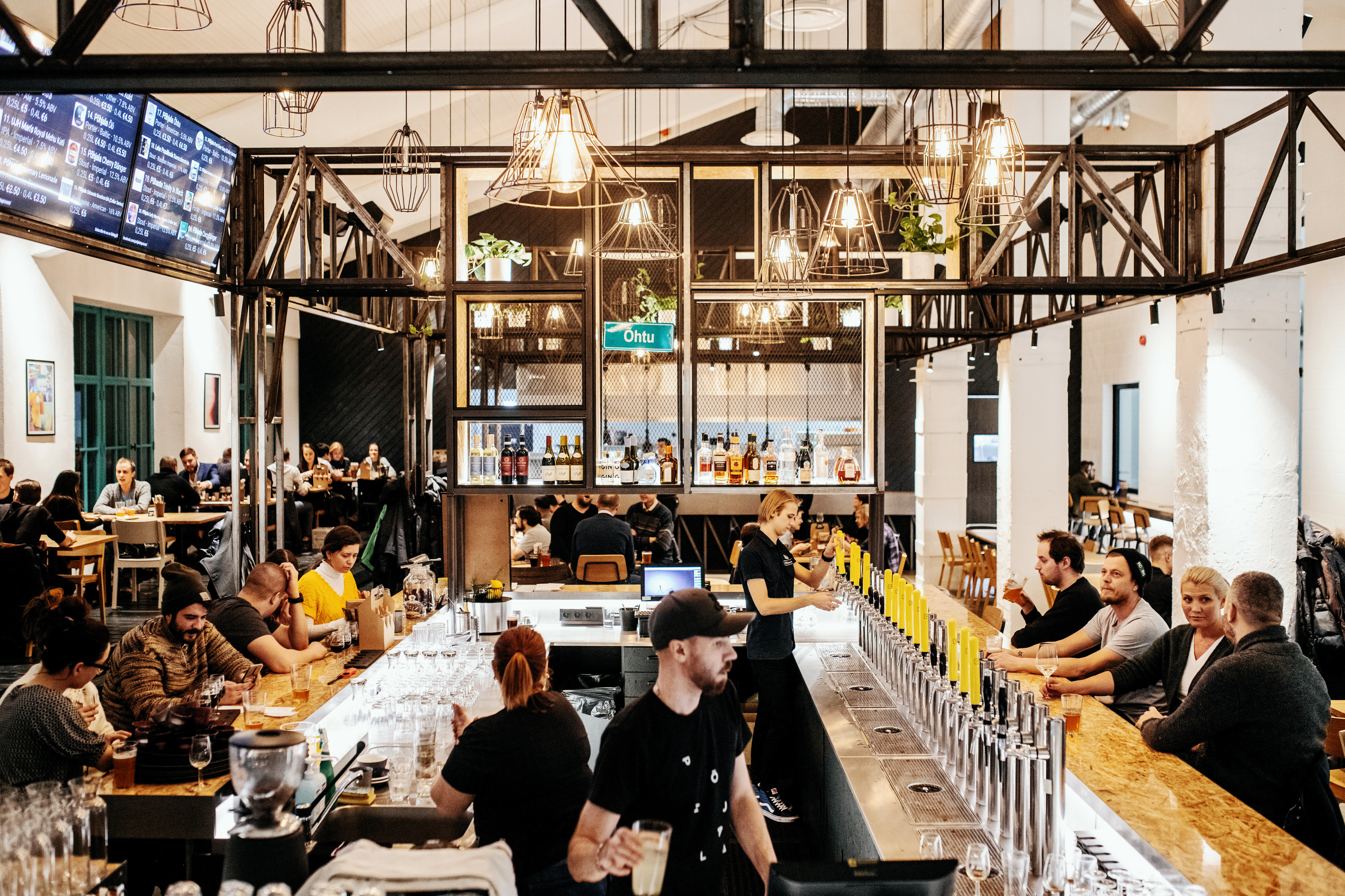 Põhjala Brewery Tap Room